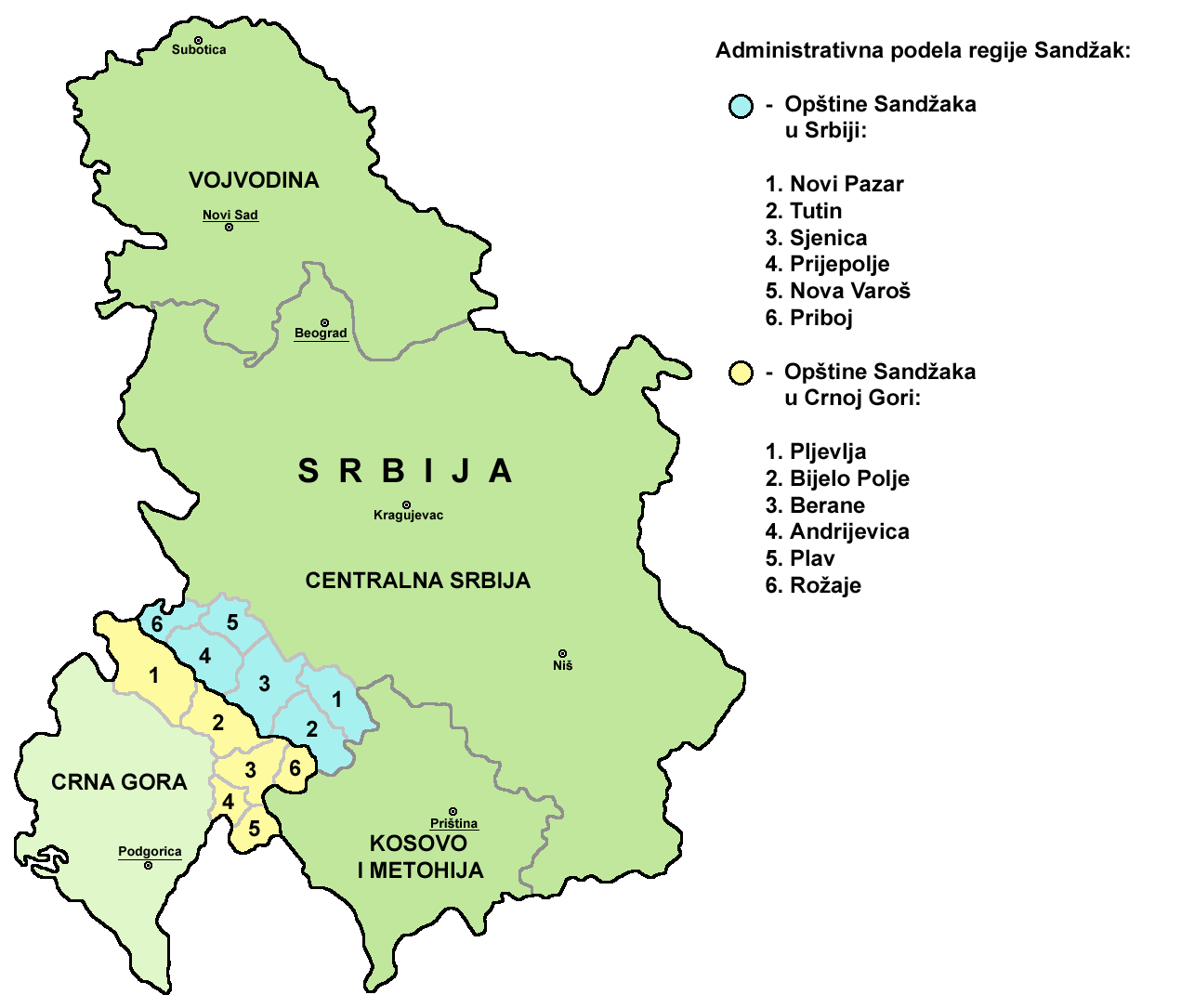 Мапа административне поделе Санџака у Србији и Црној Гори.